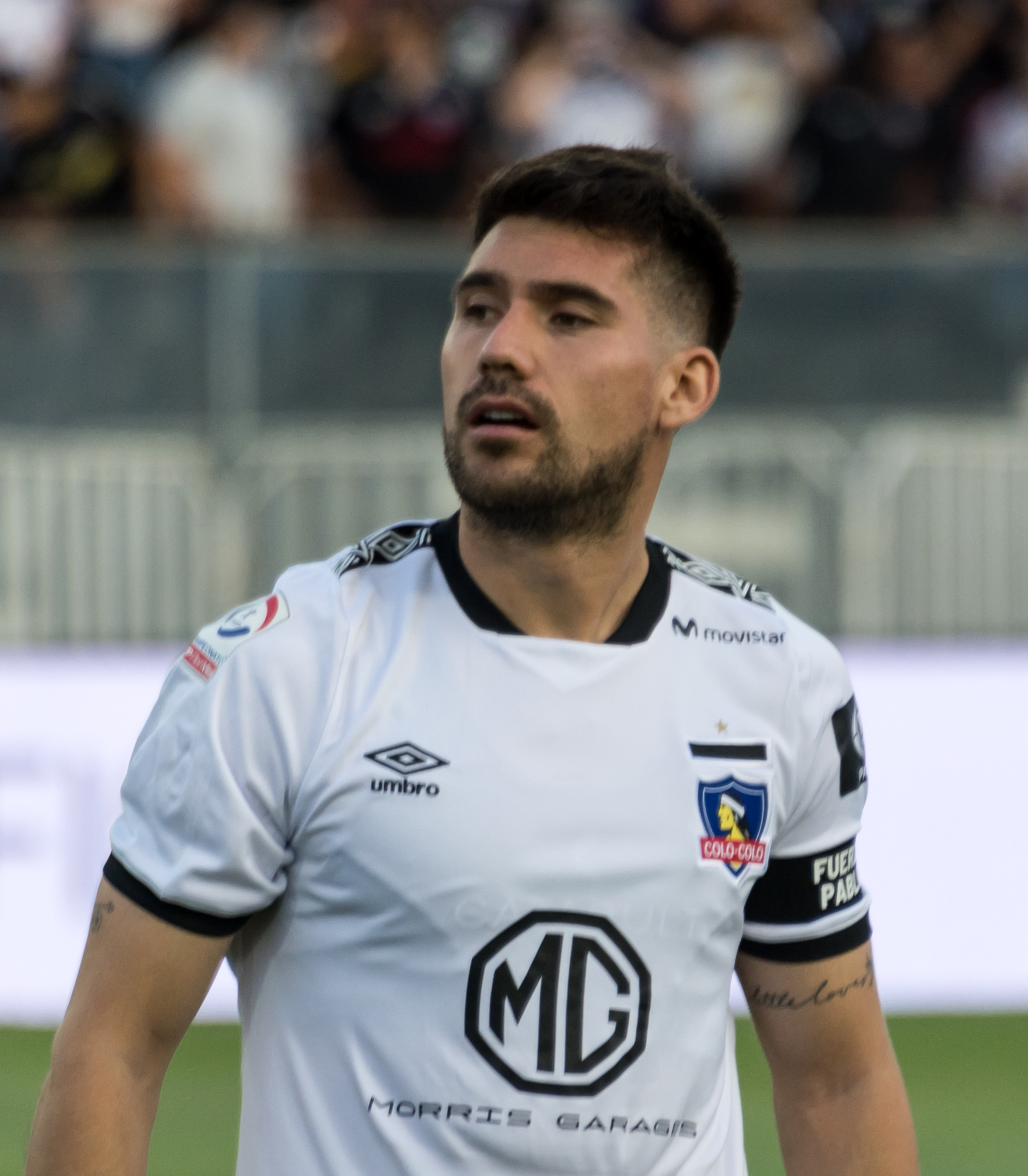 Colo-Colo v Palestino, Estadio Monumental, Macul, Santiago, Región Metropolitana, Chile